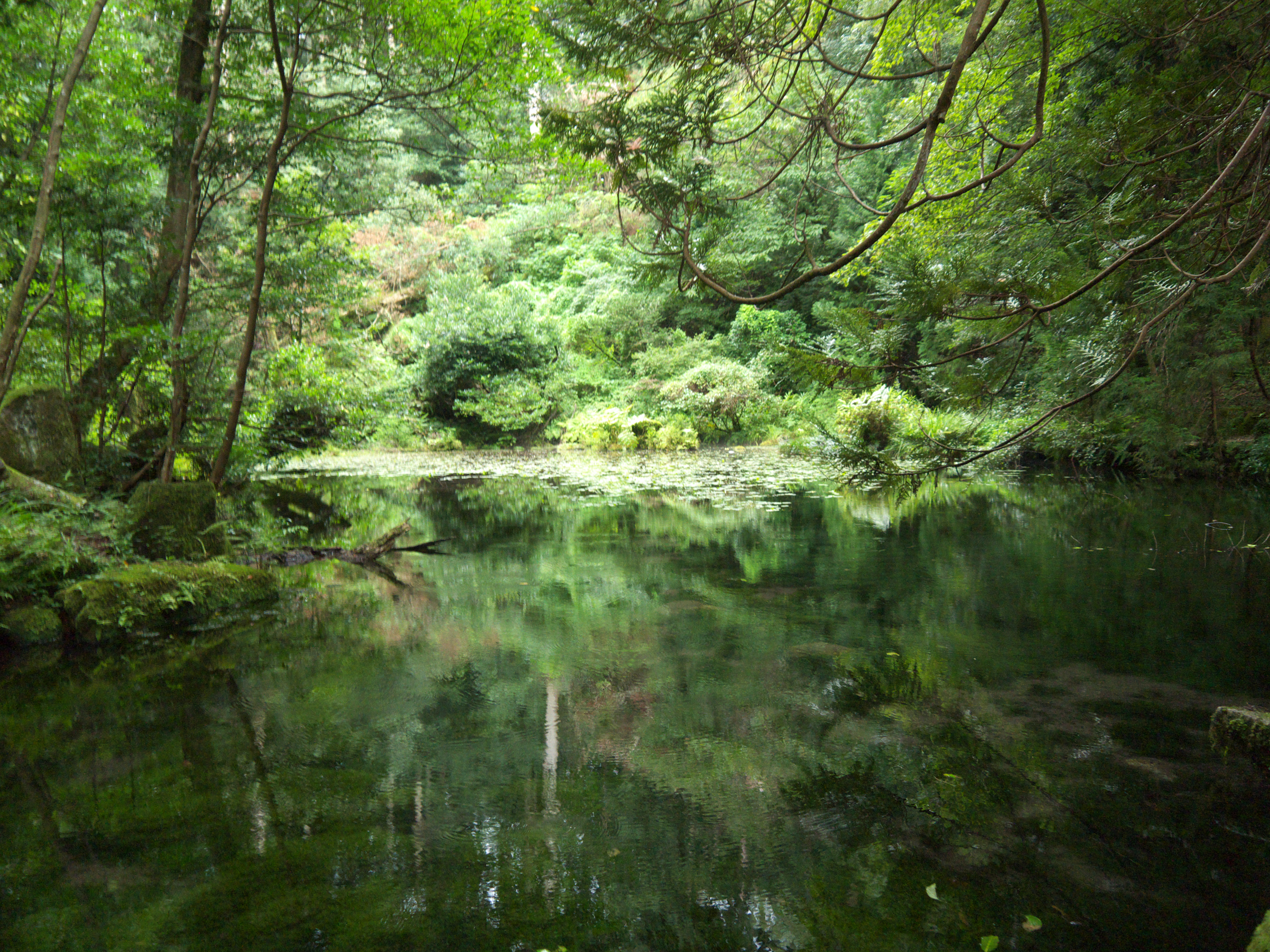 名水百選御手洗池